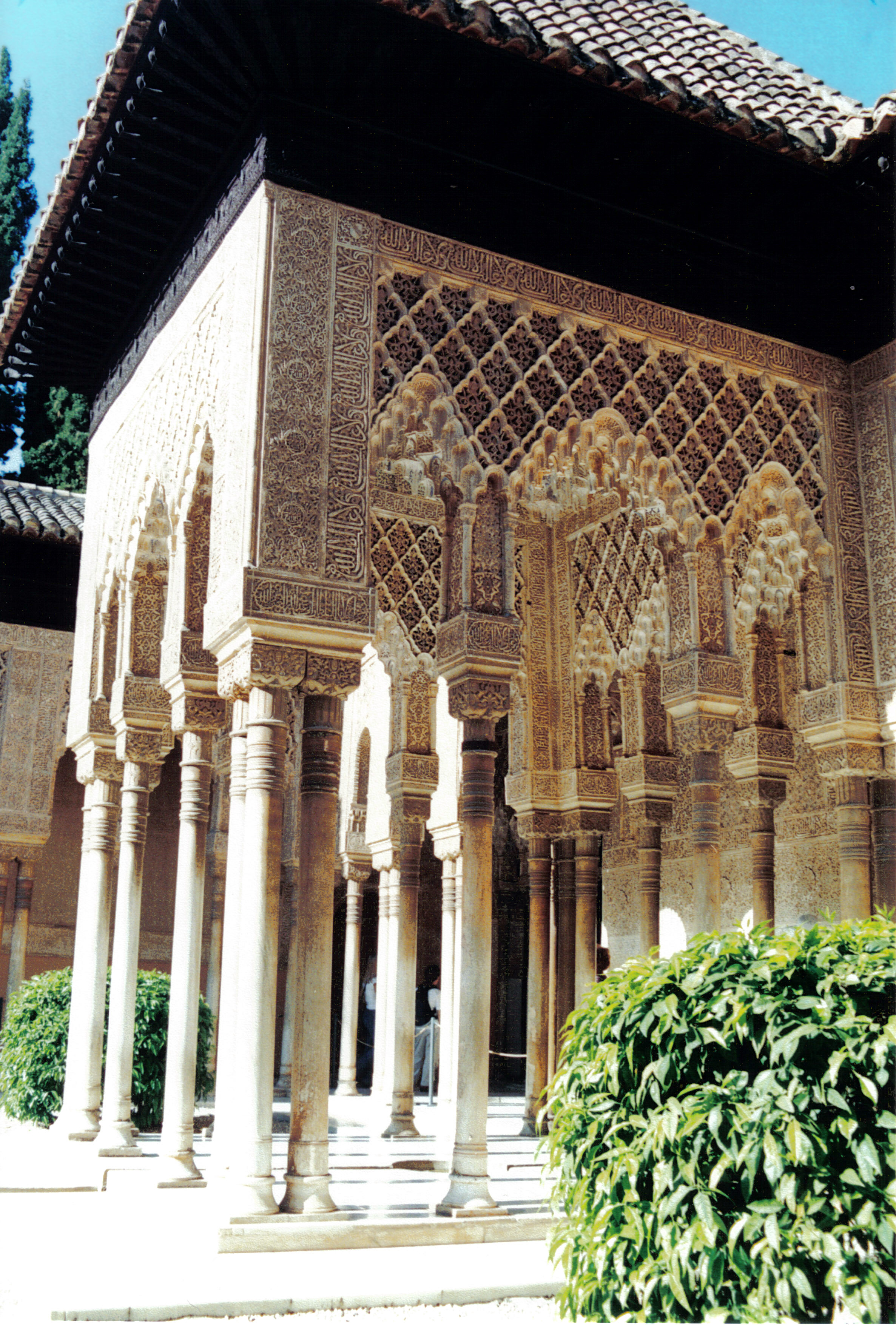 Alhambra de Grenade - Cour des Lions